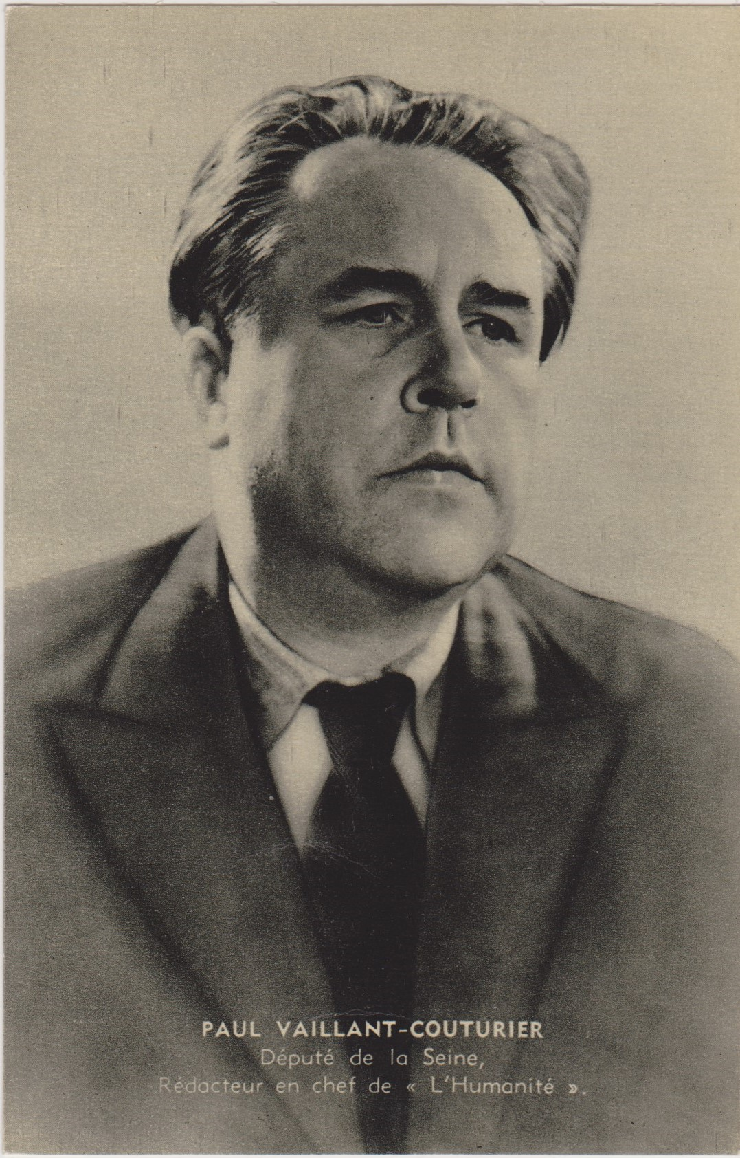 Carte photographique, au format de carte postale, présentant Paul Vaillant-Couturier, éditée probablement vers 1937 par le journal l'Humanité.